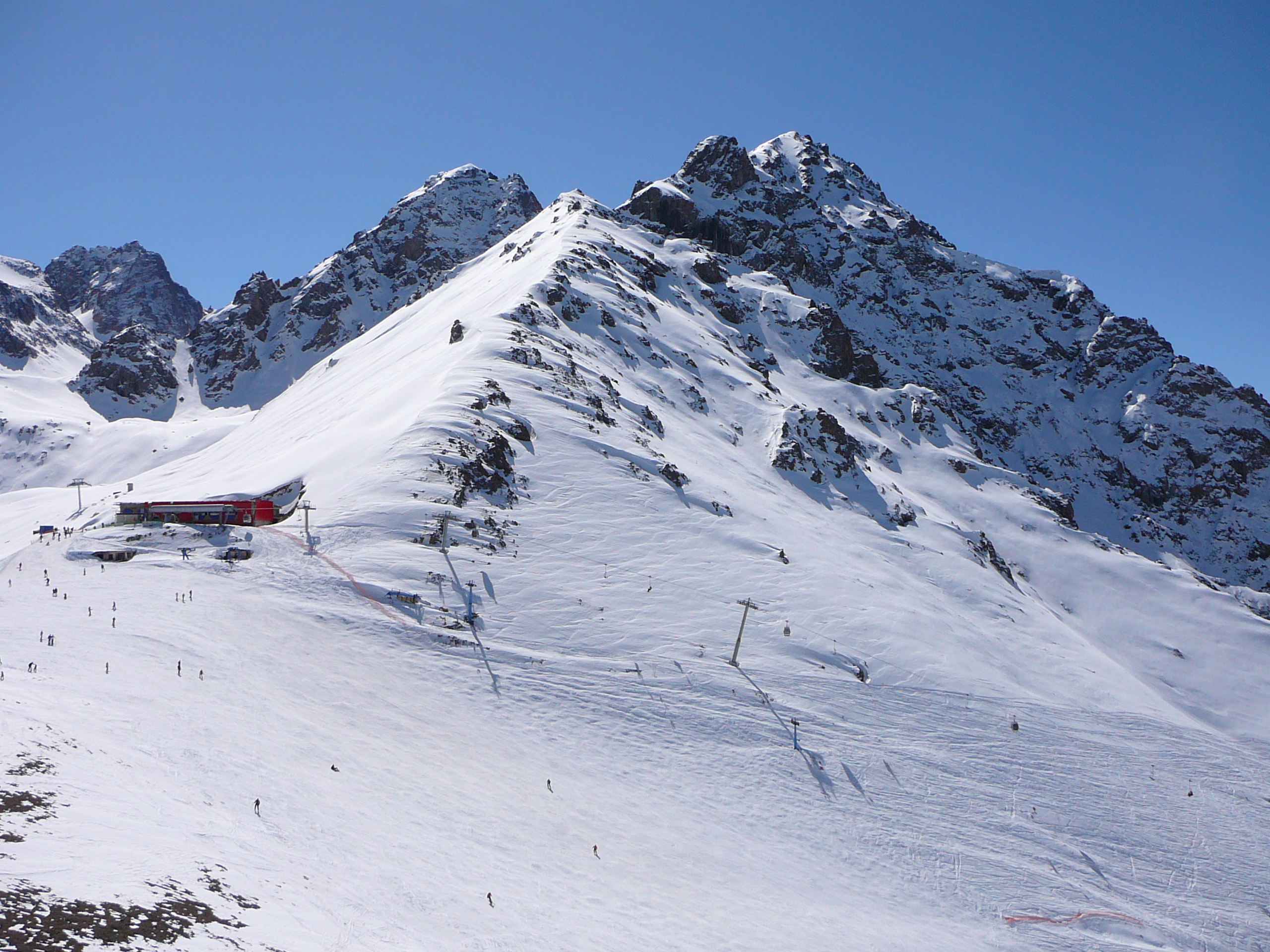 Верхняя точка горнолыжной трассы курорта Чимбулак. Талгарский перевал.